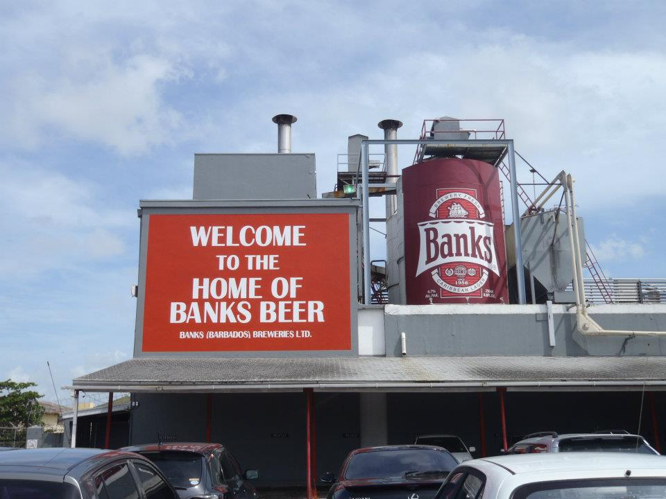 Cerveceria Banks de Barbados (2007)